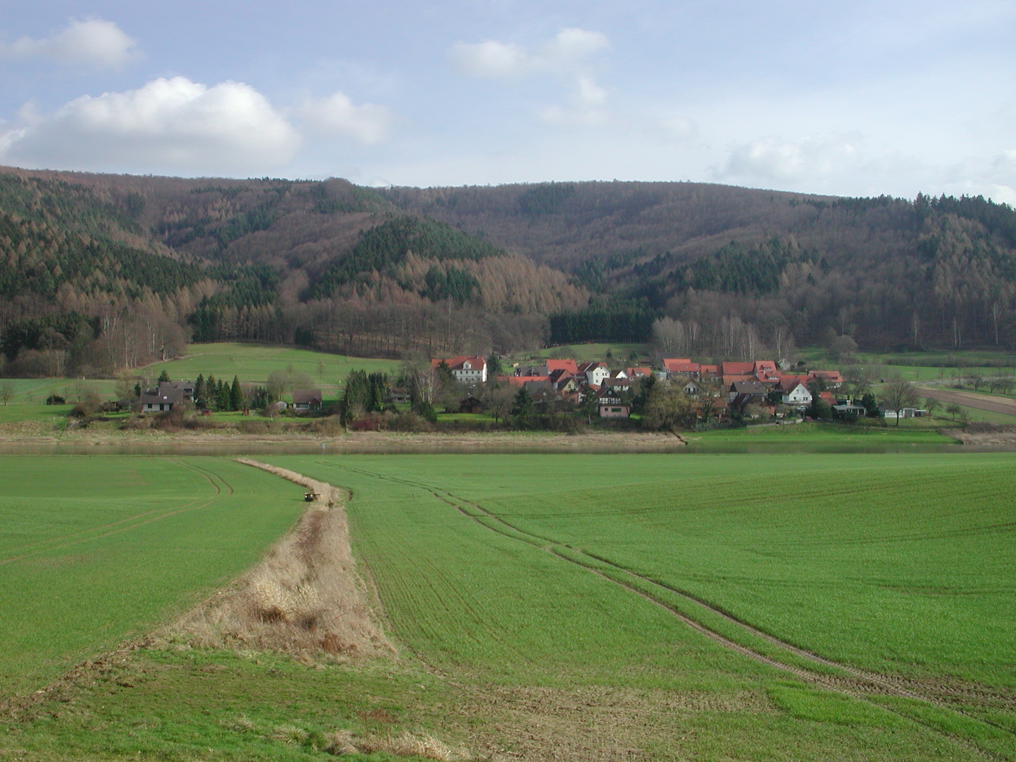 Glashütte (zu Hemeln, Stadt Hann. Münden) an der Weser